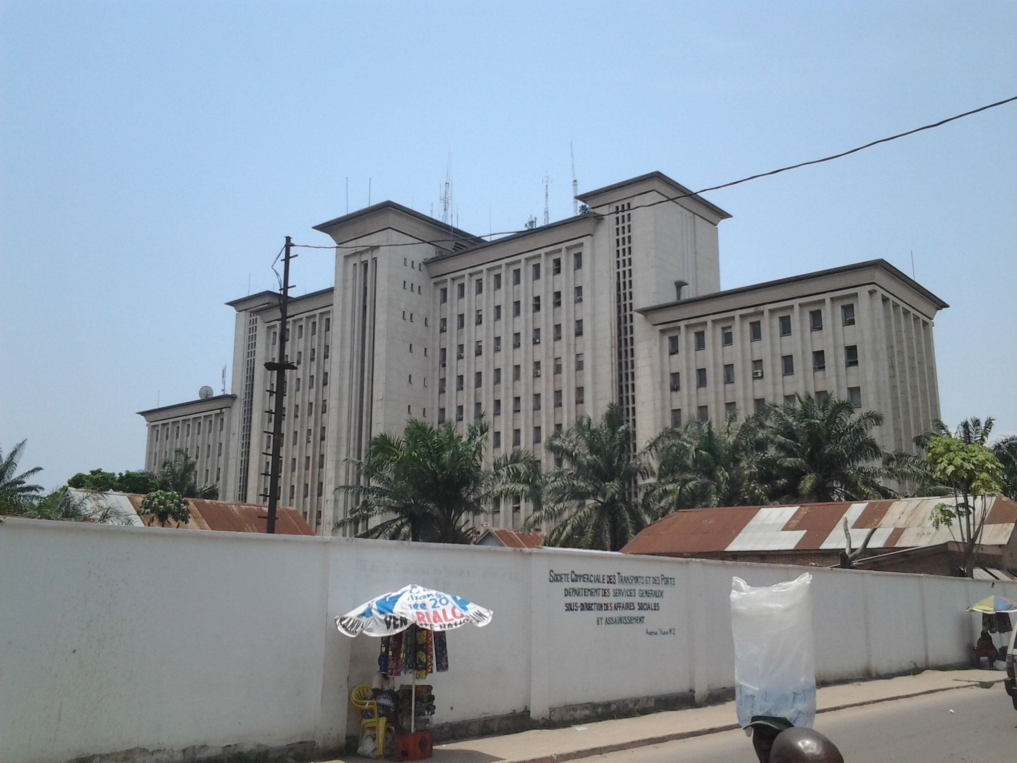 Gombe, Kinshasa Habitant et bâtiment dans la ville de Kinshasa - République Démocratique du Congo - 2013 (Photo Copyleft - Antoine Moens de hase)